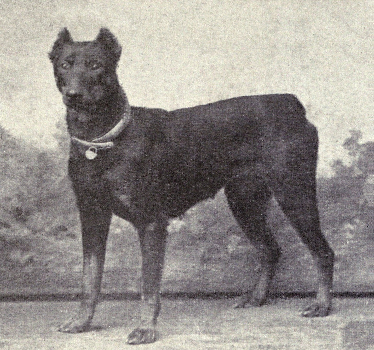 Dobermann Pinscher from 1915